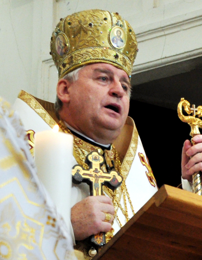 Ján Babjak